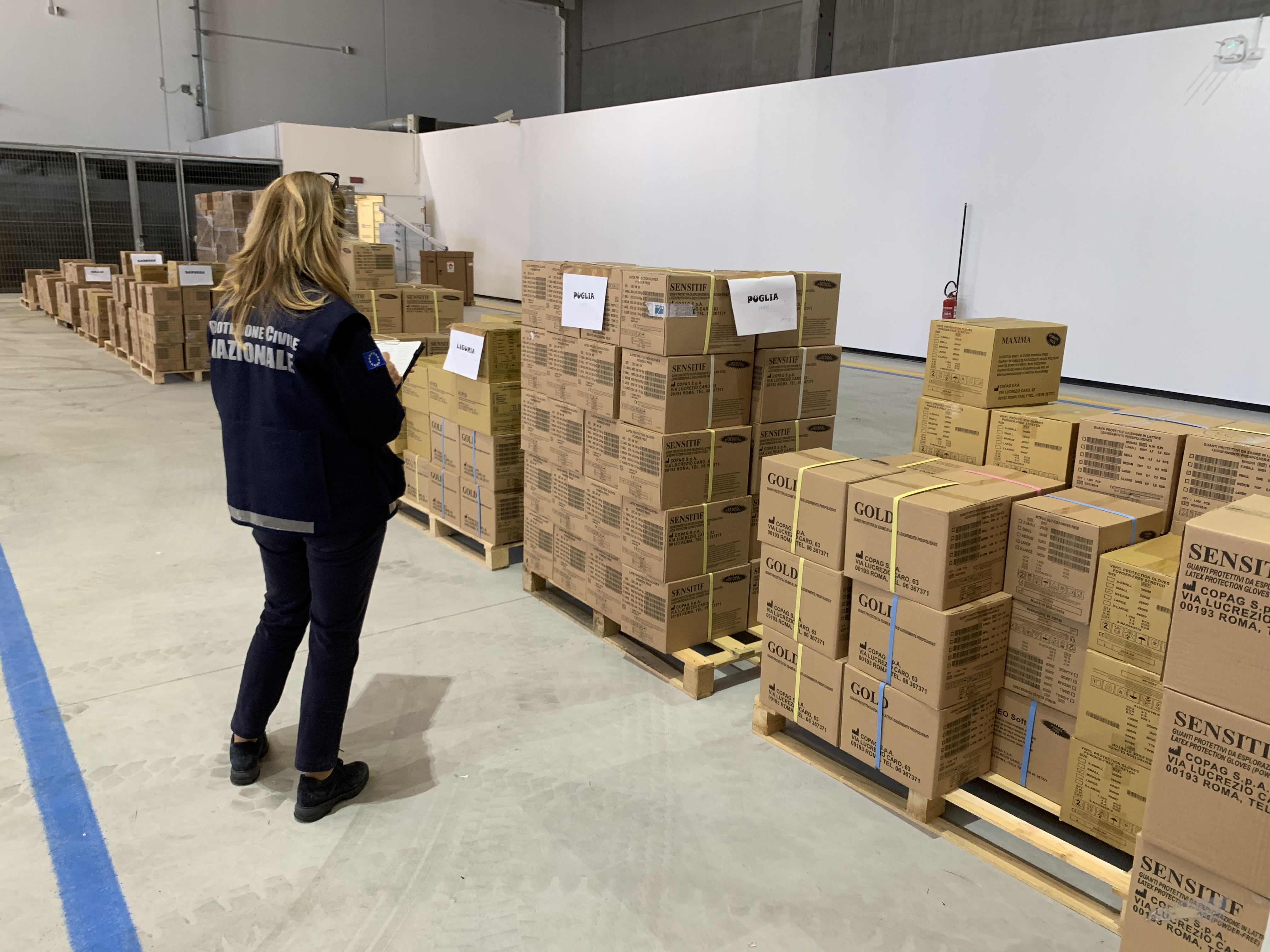 Fiumicino (RM), 11 marzo – Personale del Dipartimento della Protezione Civile predispone i DPI-Dispositivi di Protezione Individuale per l'invio alle Regioni.